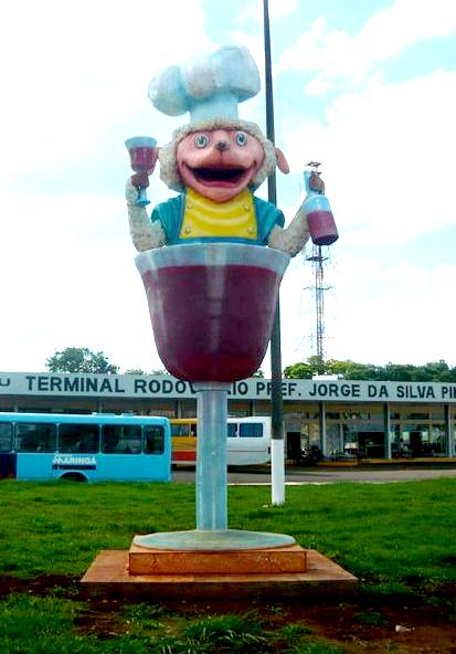 Monumento del Agnello ao Vino